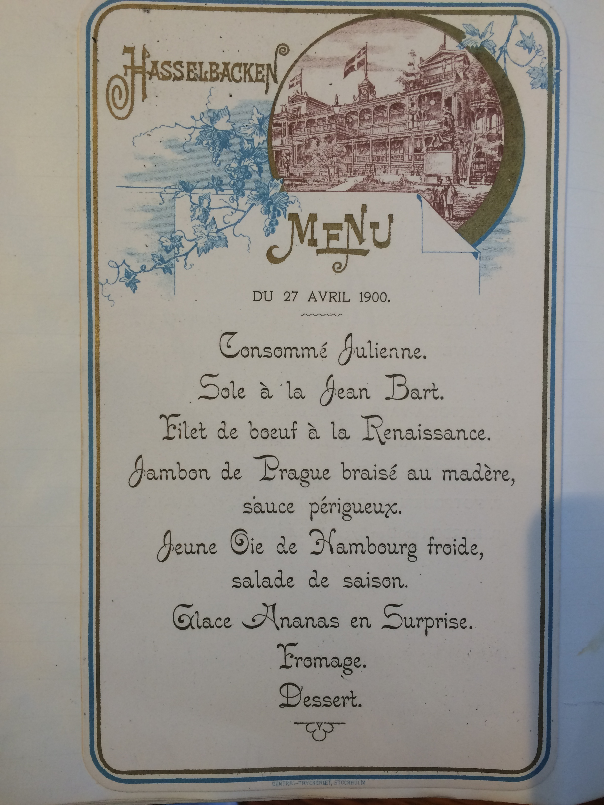 Meny från restaurang Hasselbacken den 27 april 1900, skriven på franska. Bild tagen 14-12-2016. Från Nordiska Muséets arkiv.